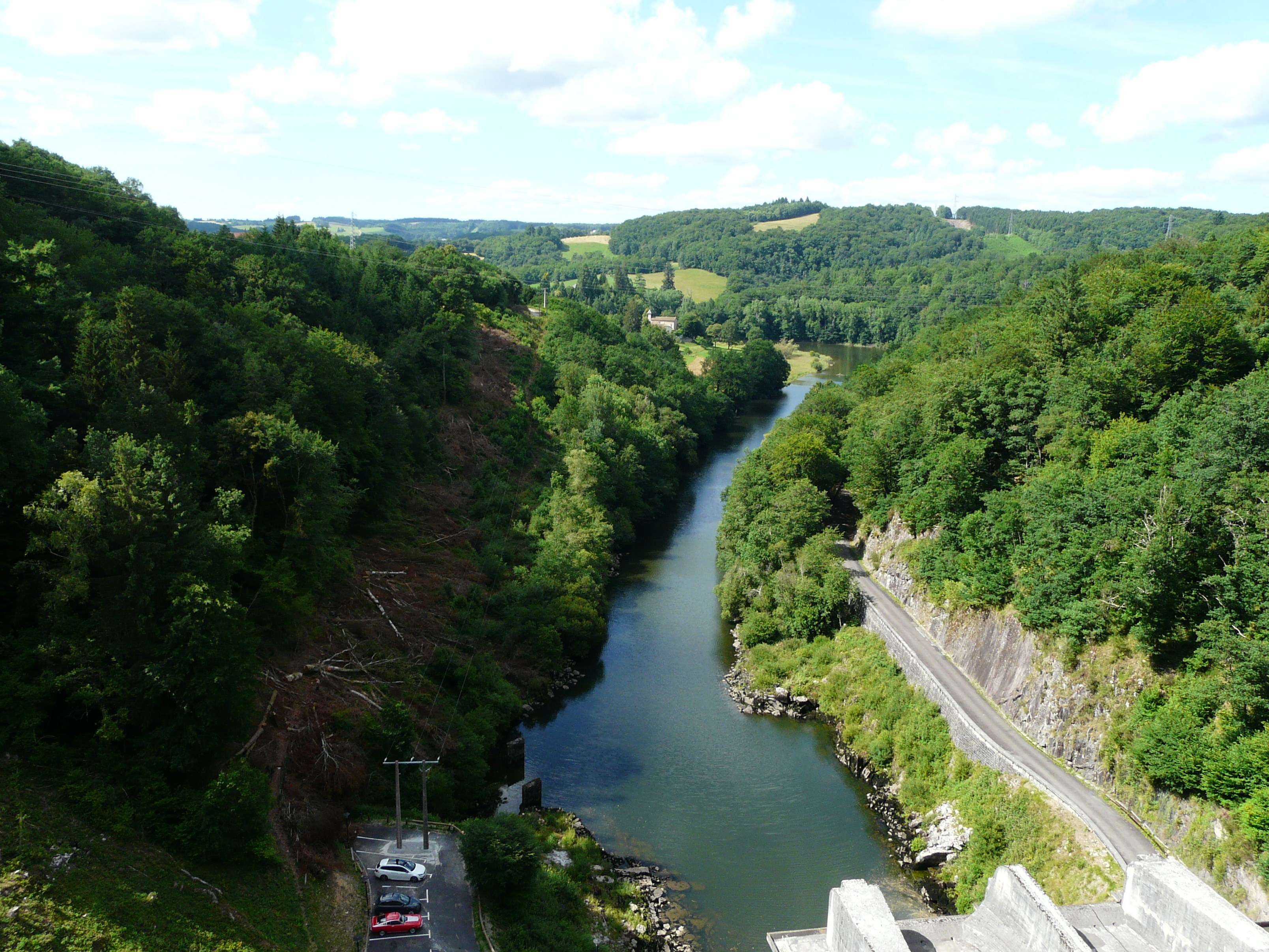 La Cère juste en aval du barrage de Saint-Étienne-Cantalès, entre les communes de Saint-Gérons (à gauche) et Saint-Étienne-Cantalès (à droite), Cantal, France.